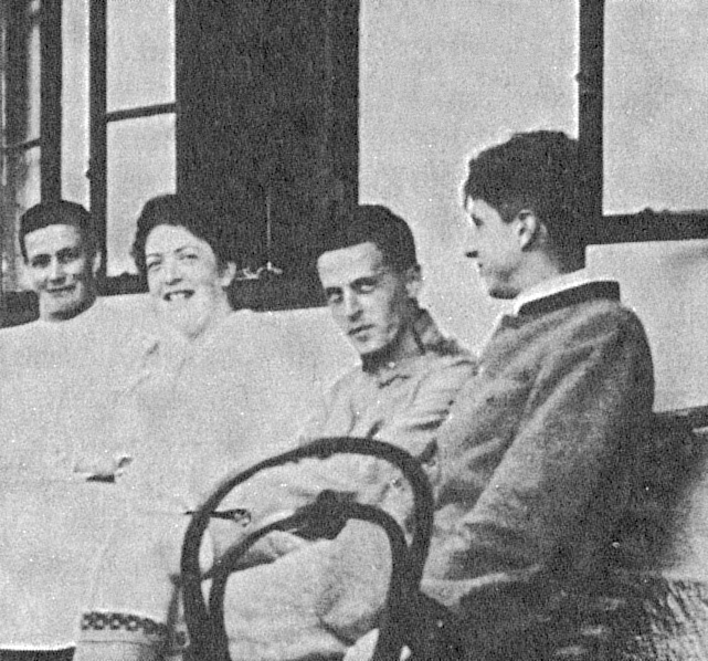 On the Hochreit, summer 1920. Ludwig Wittgenstein is seated between his sister Helene Salzer and Arvid Sjogren.